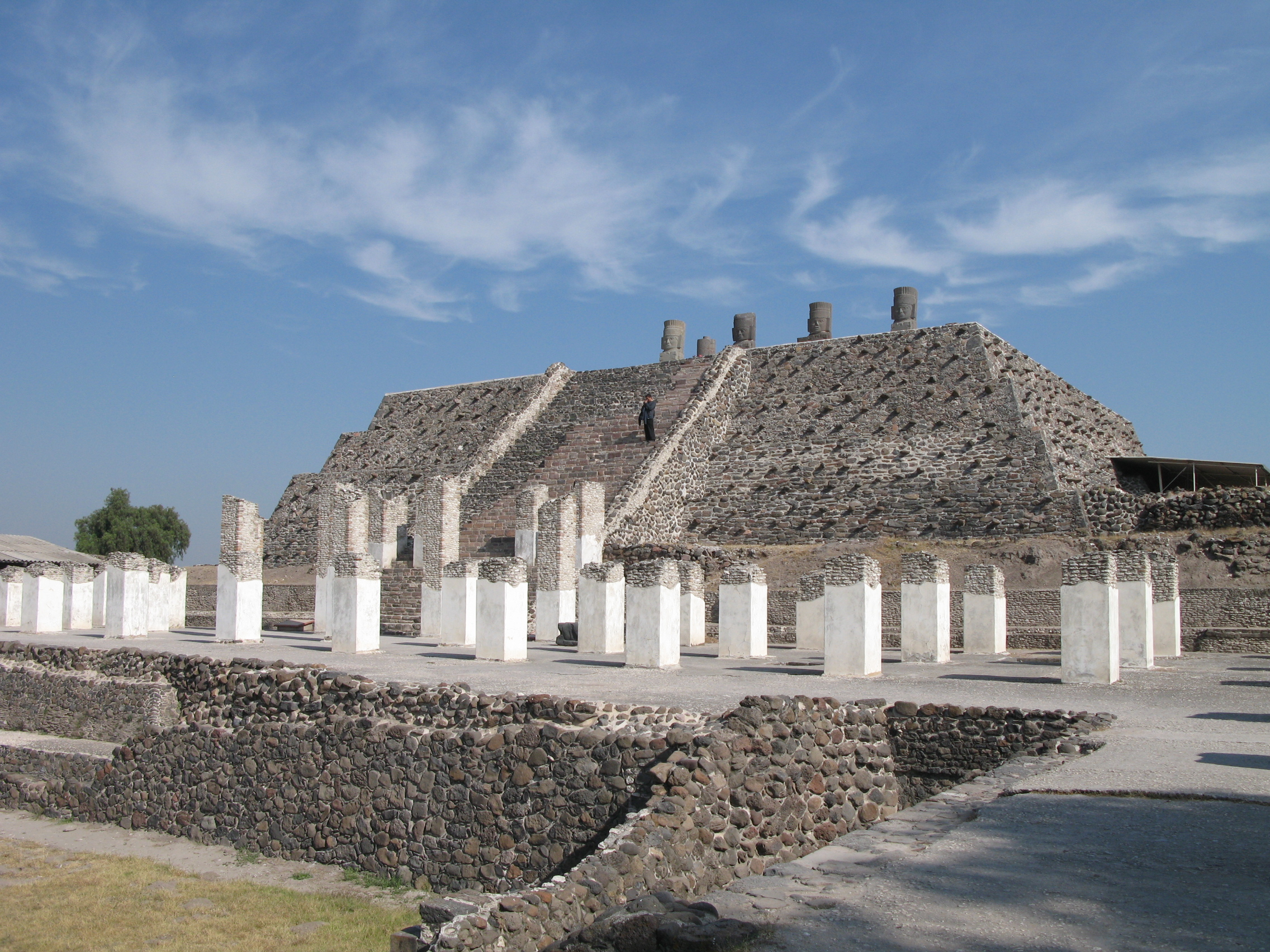 Tempeljska piramida v Tuli, Mehika.